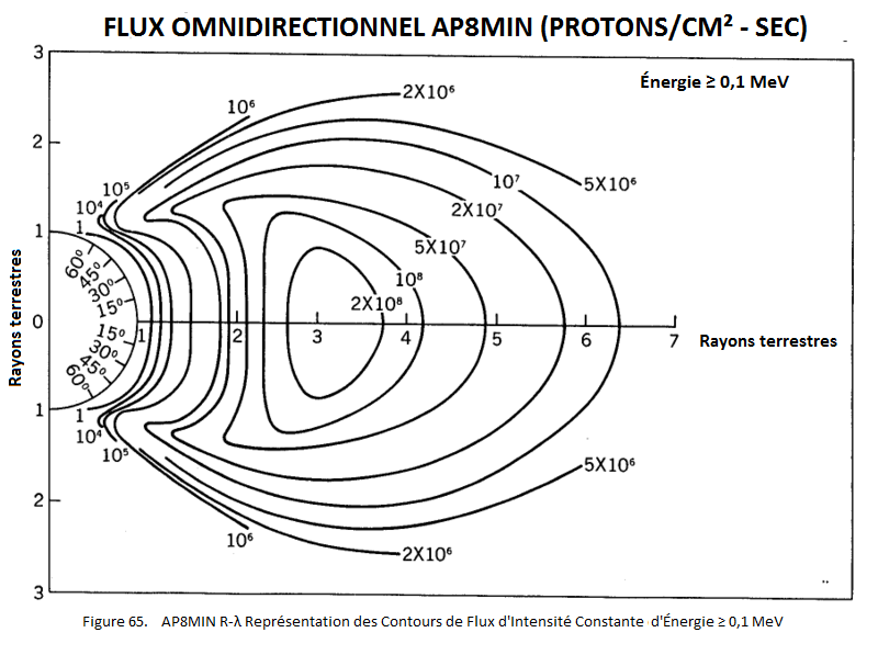 Flux omnidirectionnel complet de protons d'énergie supérieure à 0,1 MeV dans les ceintures de Van Allen.